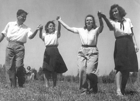 הקורס הארצי הראשון למדריכי ריקודי עם בסמינר הקיבוצים: משמאל- רפאל, ואיילה בניה של גורית, גורית קדמן ואבישג ביתו של ליאו קדמן